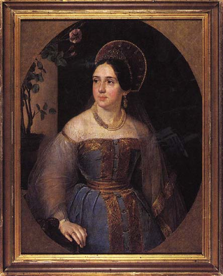 Карзинкина Екатерина Ивановна (после 1838)